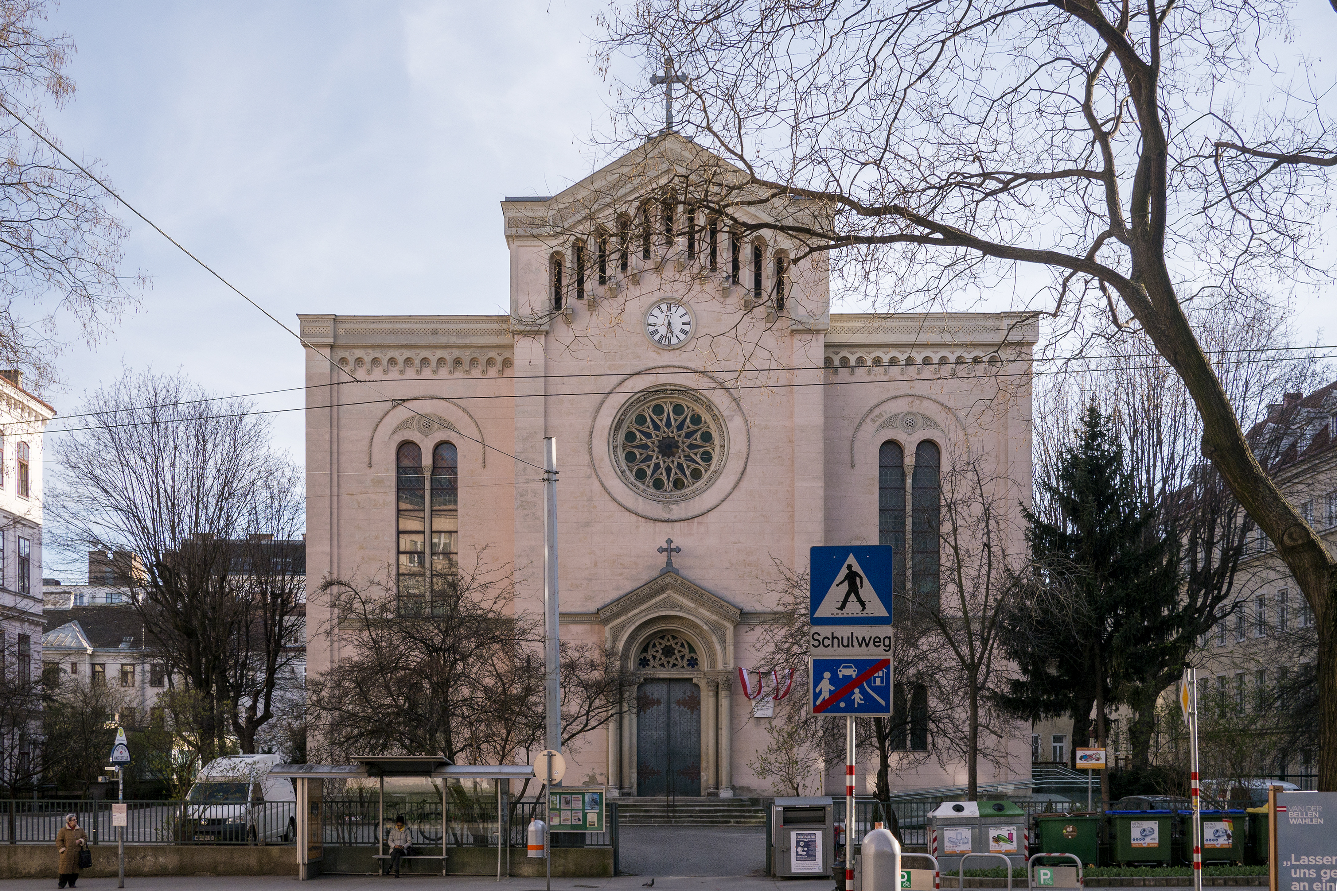 Gustavus Adolphus Church, Vienna